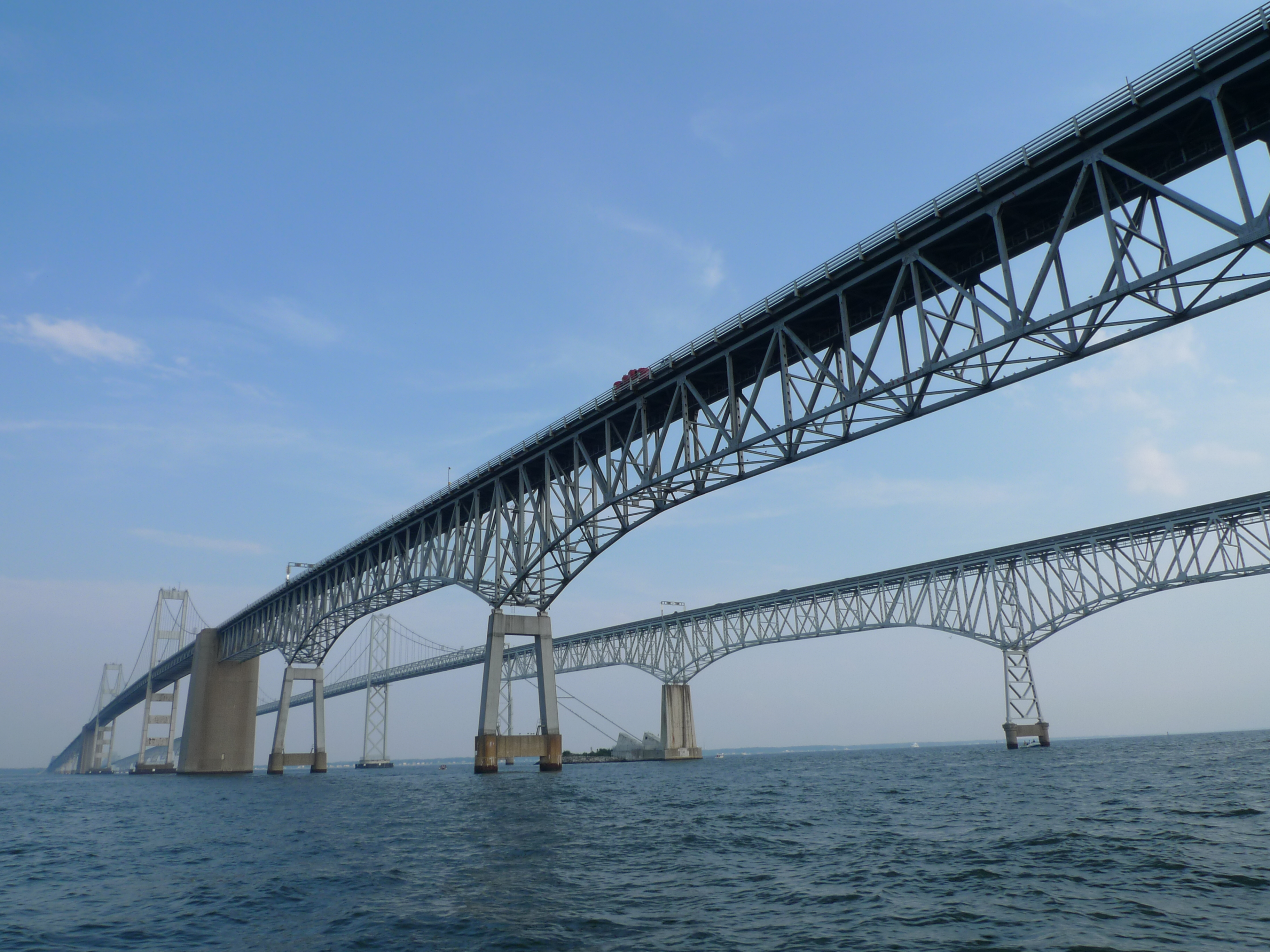 Annapolis, Maryland, Usa